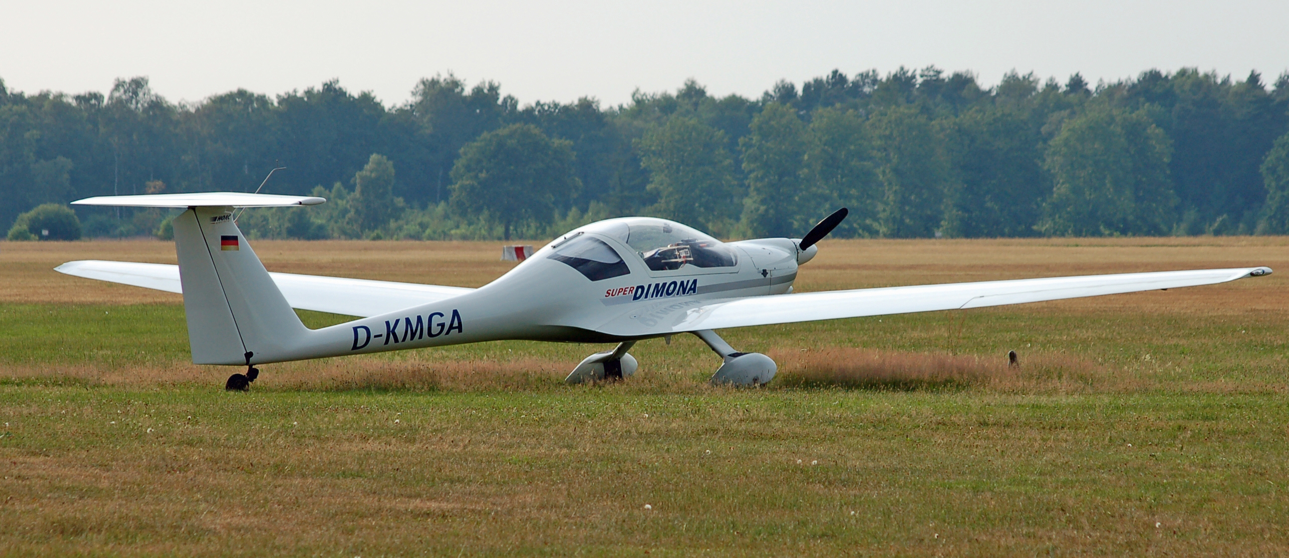 Hoffmann HK-36R Super Dimona (D-KMGA) auf dem Flugplatz Uetersen